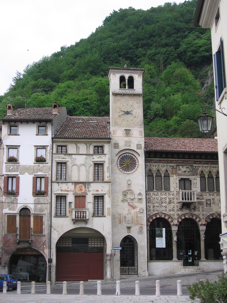 Torre dell'orologio a Serravalle (Vittorio Veneto).